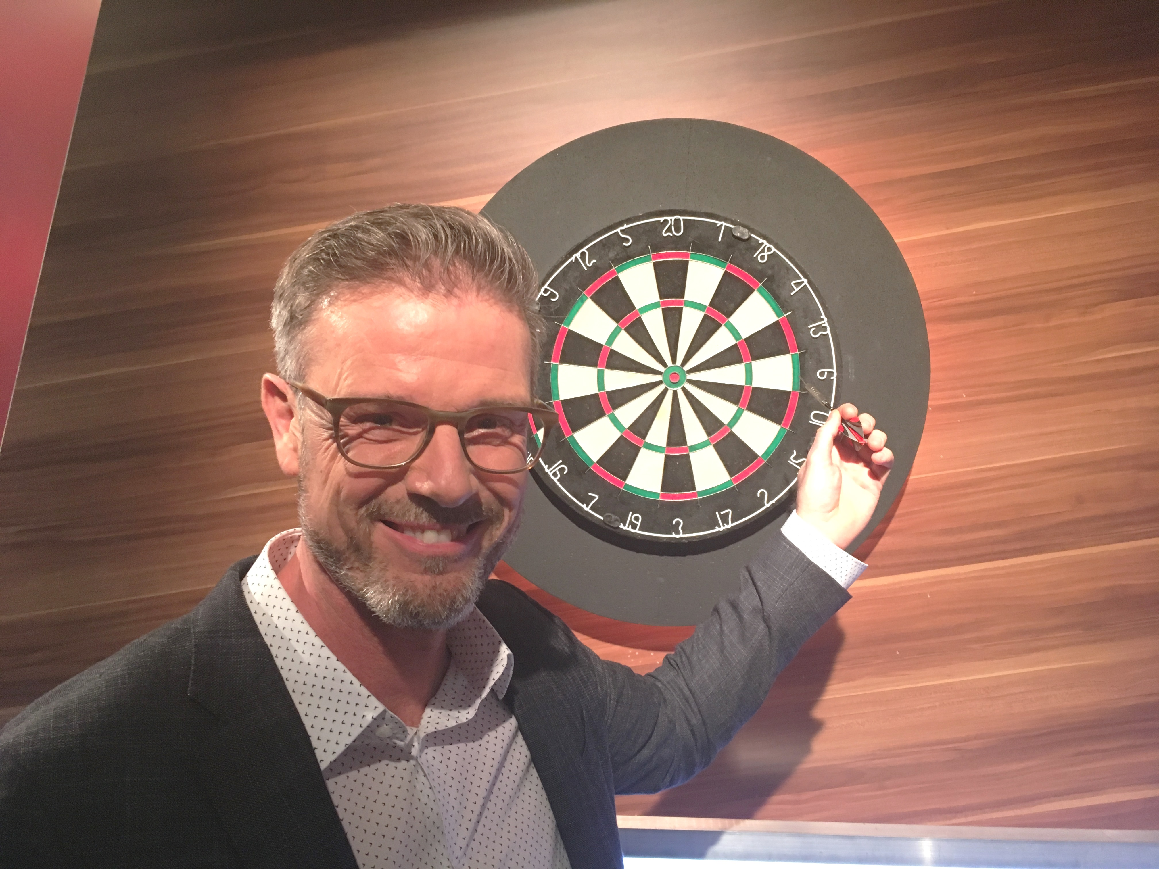 Michael Antwerpes im Studio des SWR (2019)